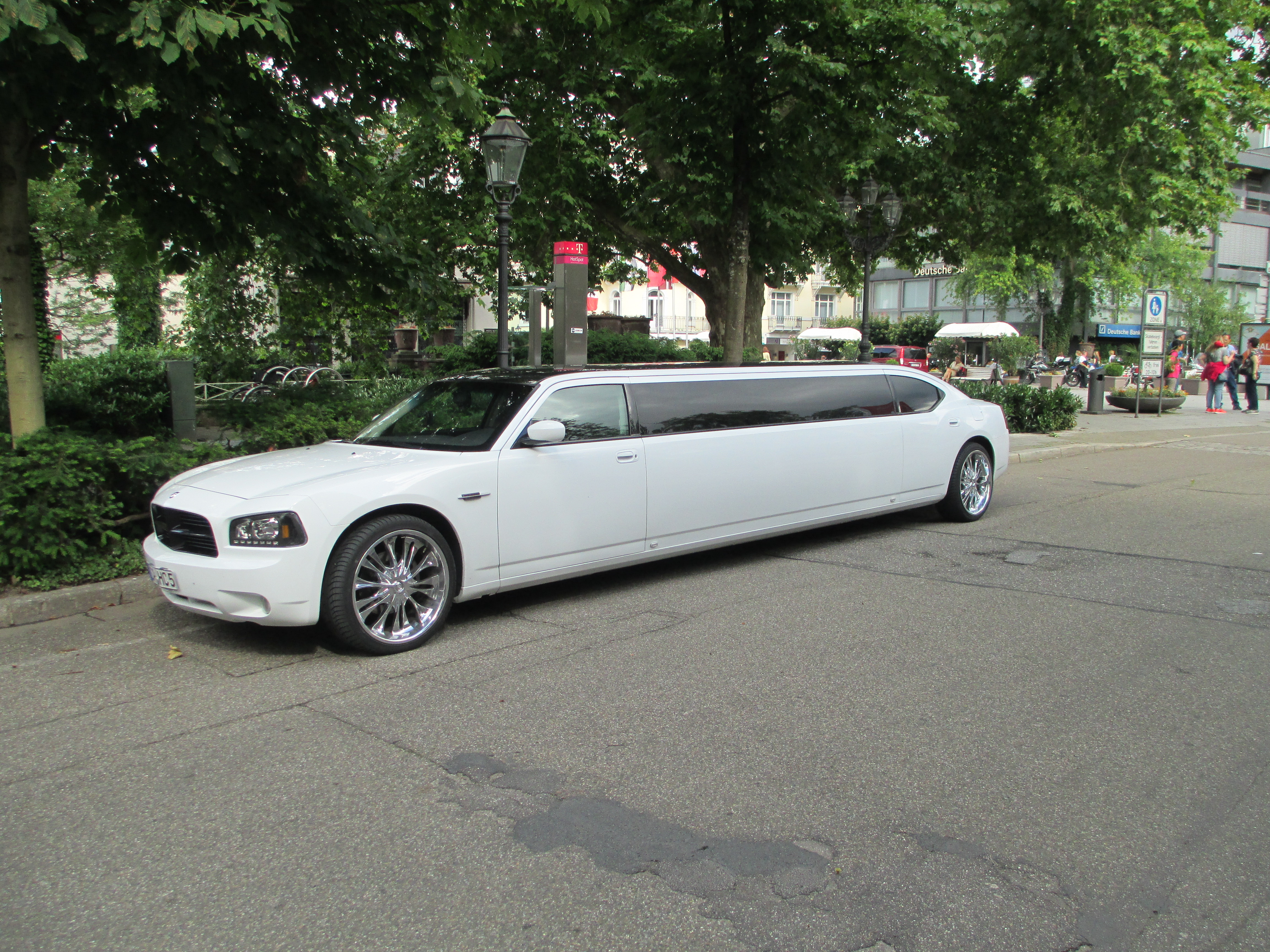 ליד לימוזינה בבאדן באדן